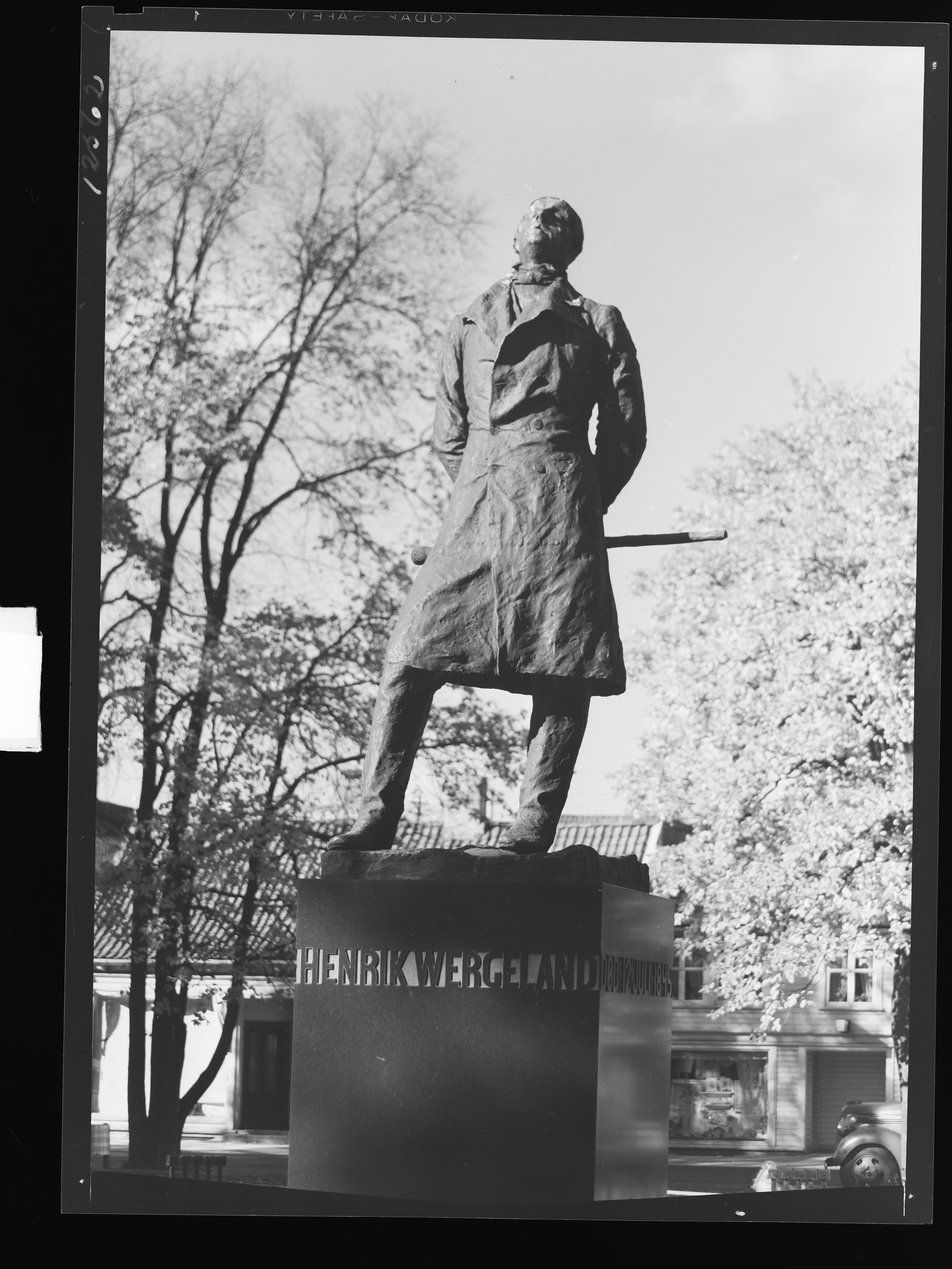 Bildet er hentet fra Nasjonalbibliotekets bildesamling. Anmerkninger til bildet var: Fotograf:Ukjent Kristiansand, Kristiansand, Vest Agder